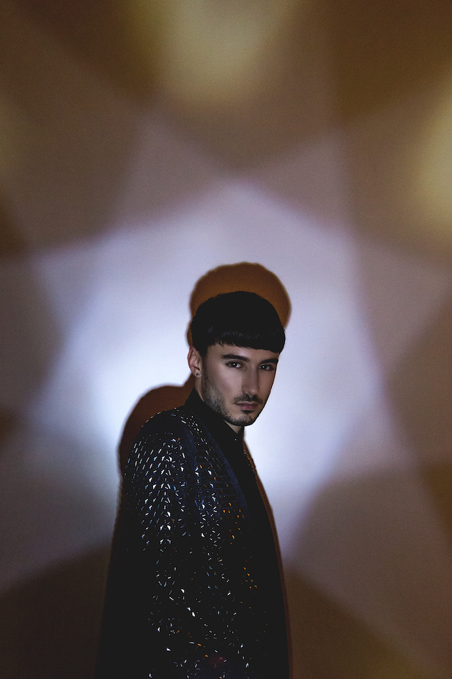 Dieses Bild ist von mir selbst fotografiert.